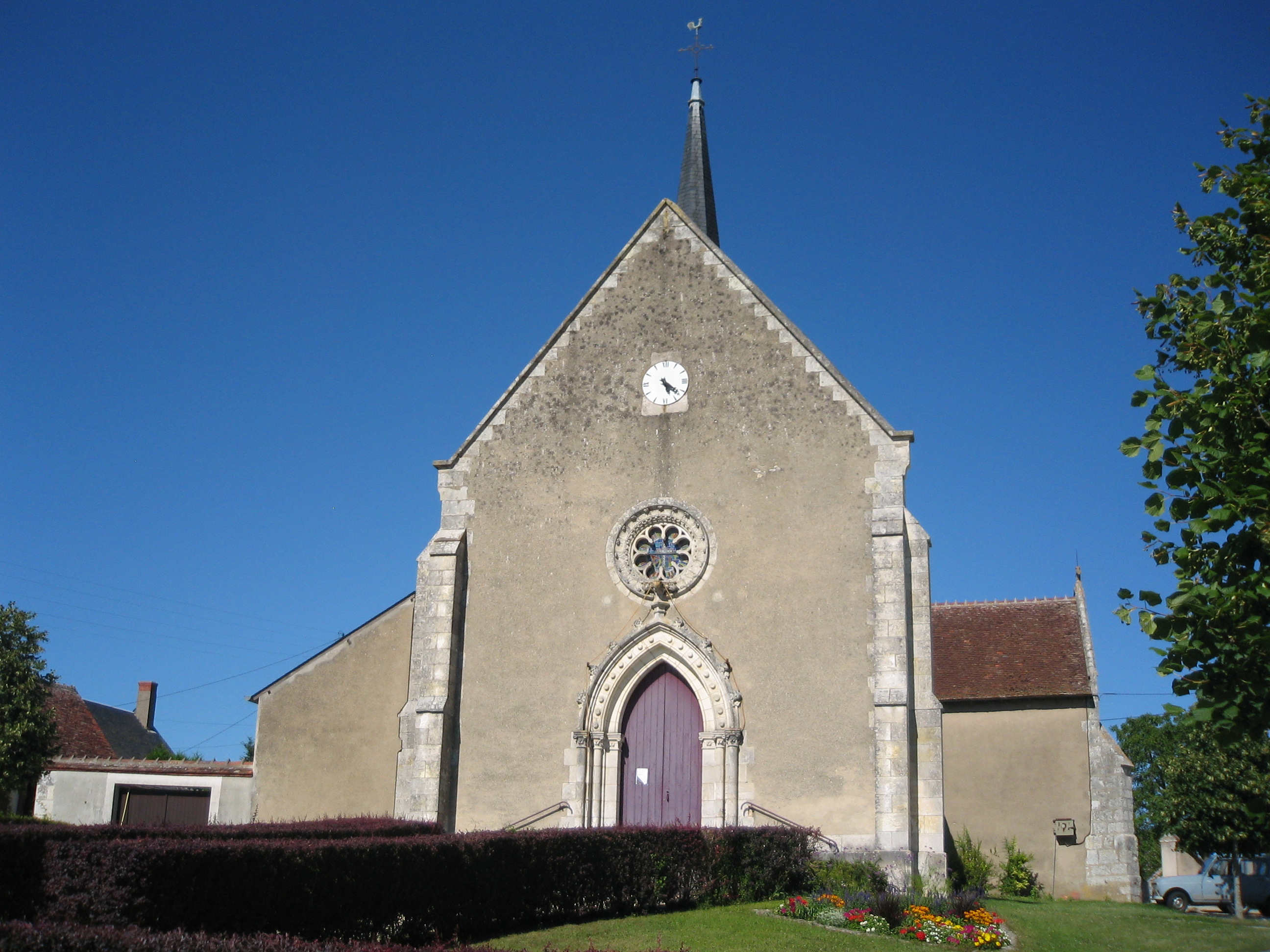 Eglise de saint Ambroix, XII°, XVI° et XIX°.